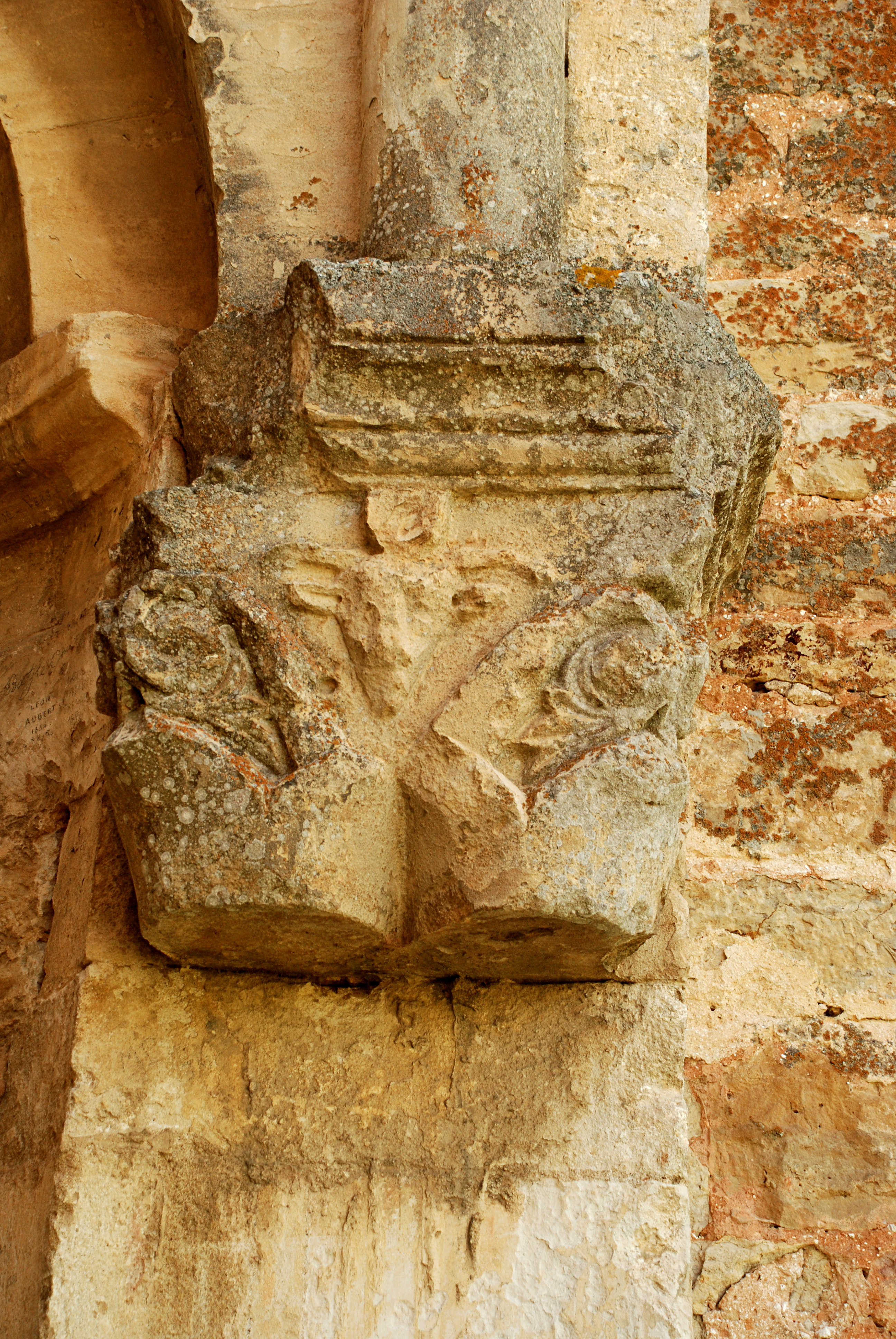 France - Gard - Chapelle Saint-Martin de Saint-Victor-la-Coste